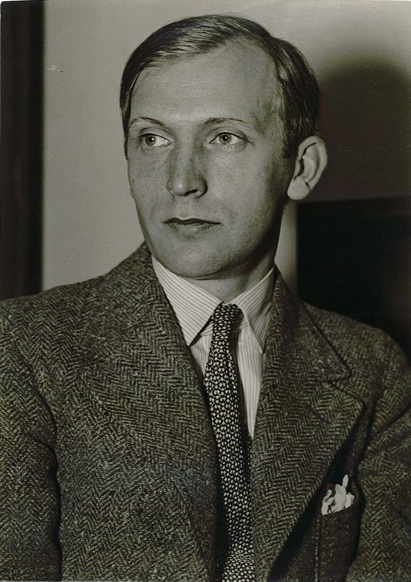 Knut Andreas Hergel (1899-1982), norsk skuespiller og teatersjef. Teatersjef ved Det norske teateret og senere ved Nationaltheatret. Portrett, mann, sceneinstruktør, teatersjef, brystbilde.